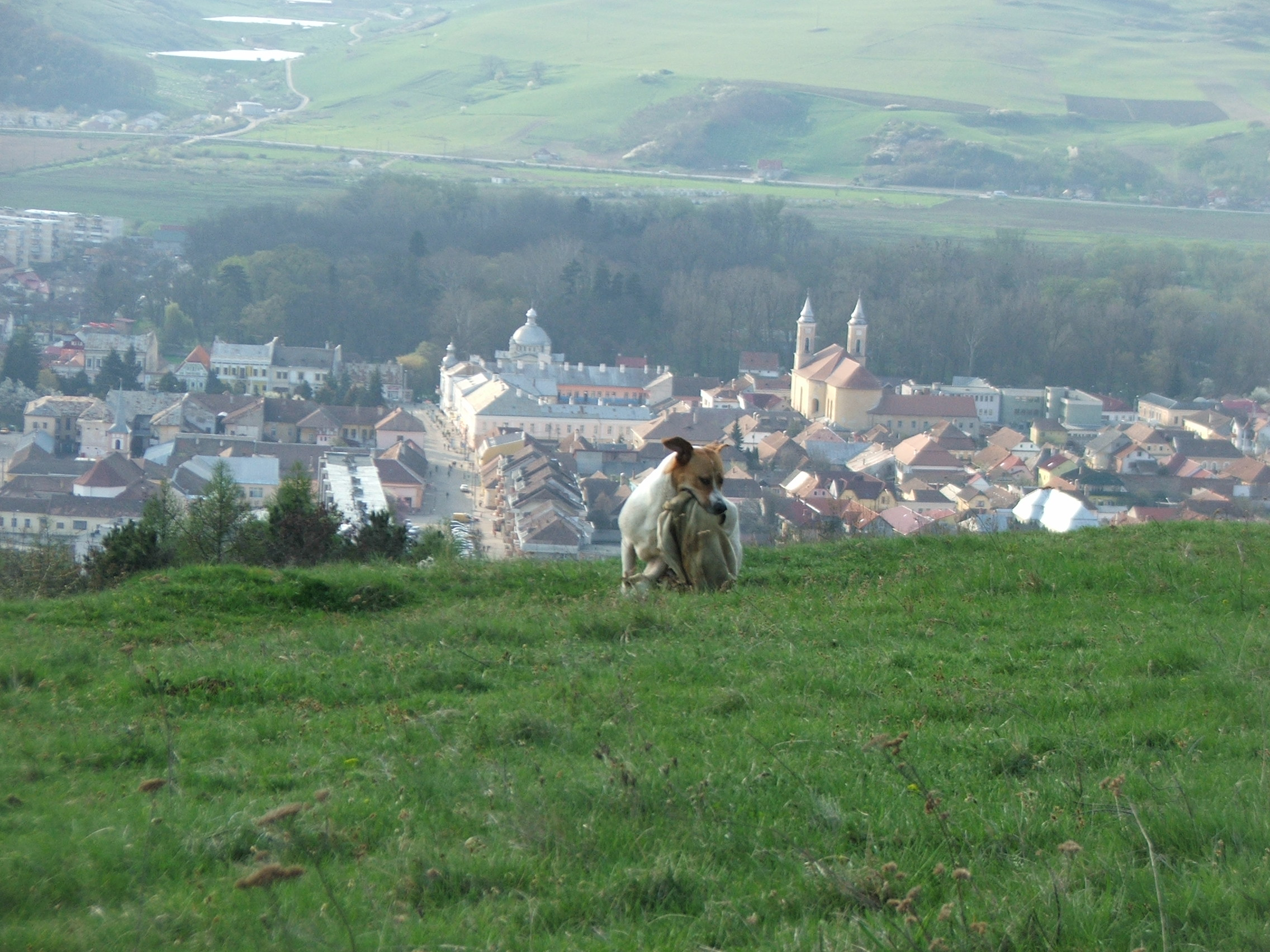 Oraşul Gherla văzut de pe deal